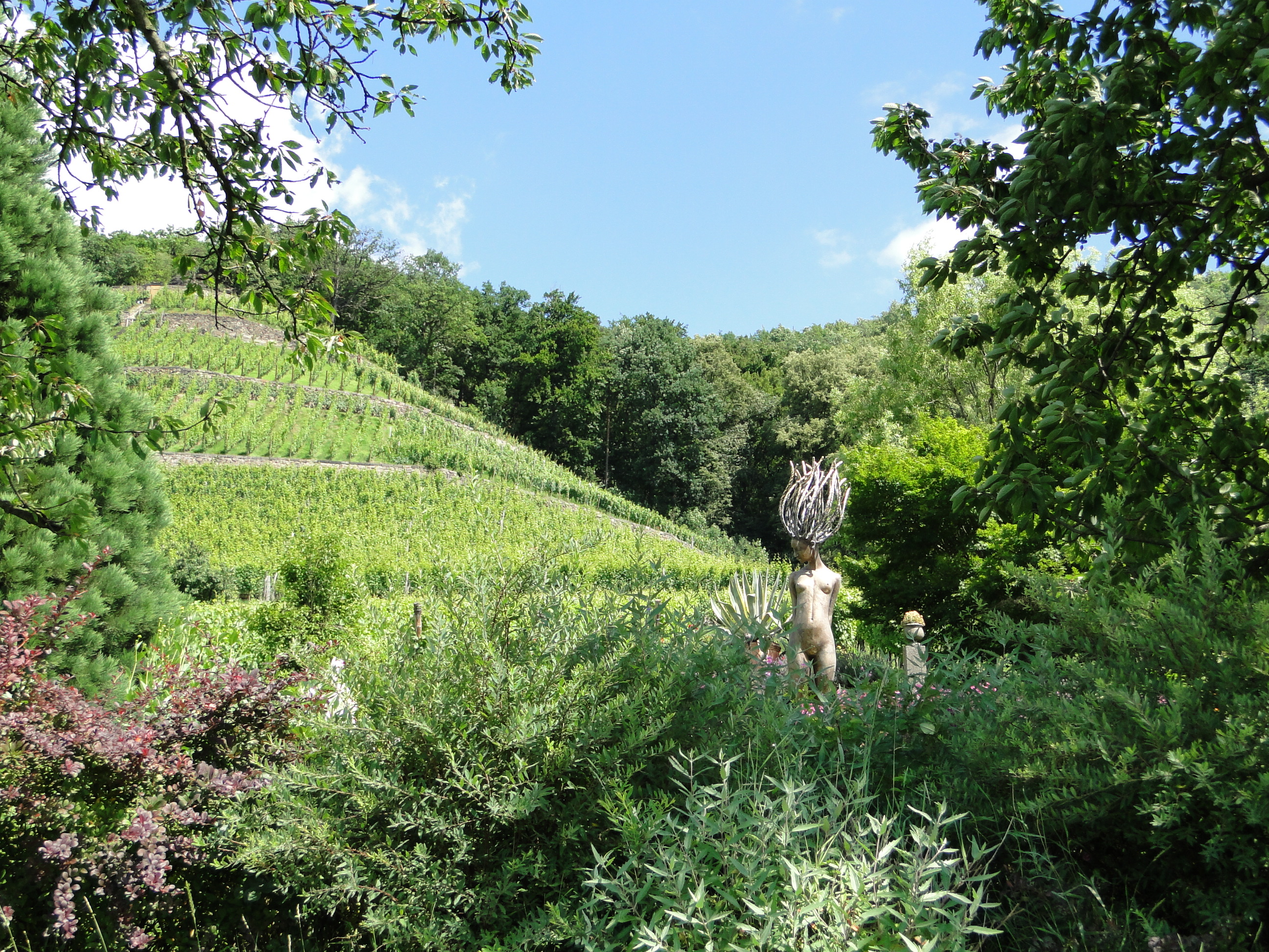 Weinbergsanlage Rysselkuppe Dresden-Pillnitz mit einer Skulptur von Malgorzata Chodakowska, vom Bergweg aus fotografiert